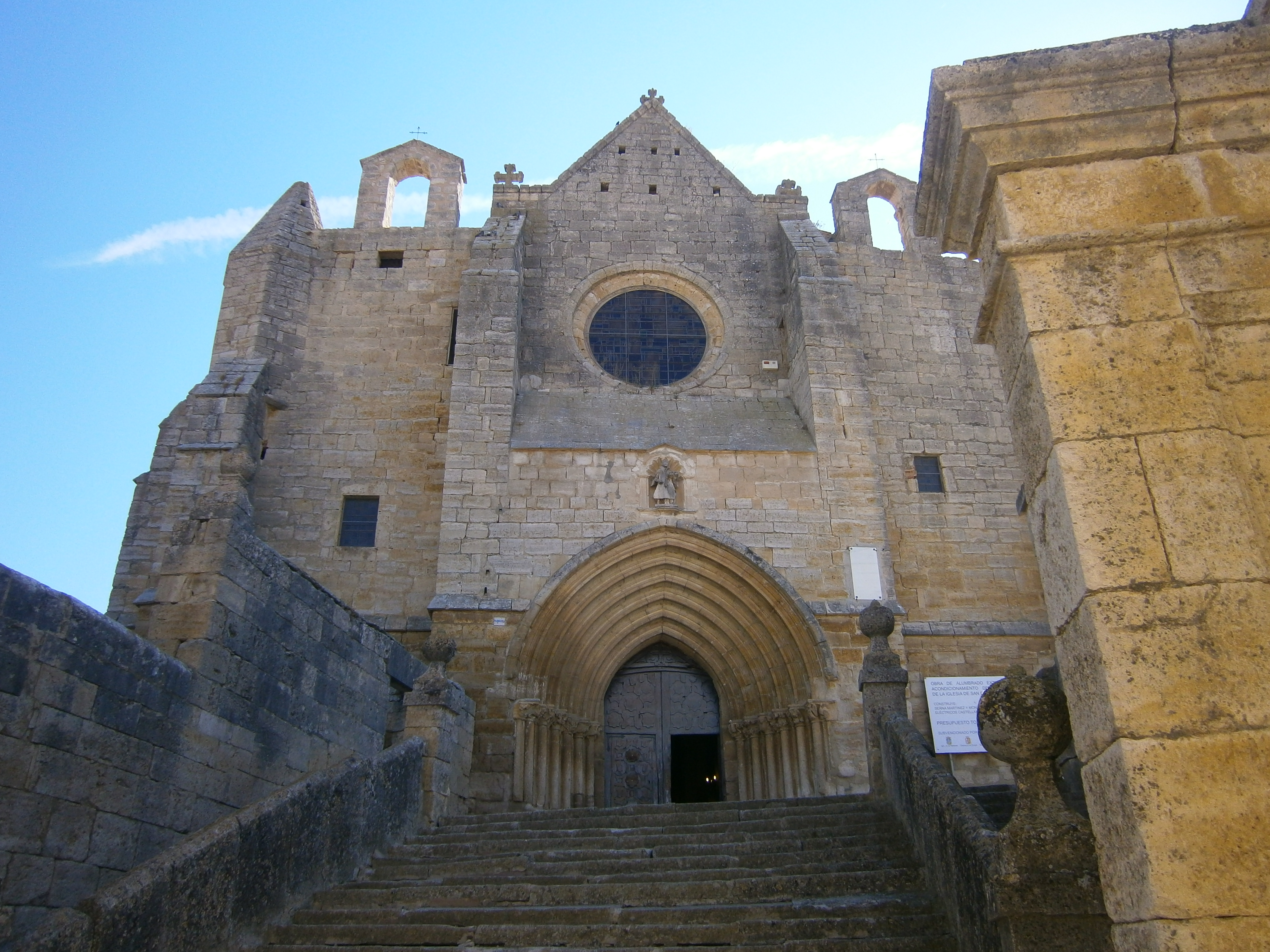 Fachada principal de la Iglesia de San Esteban (Los Balbases)